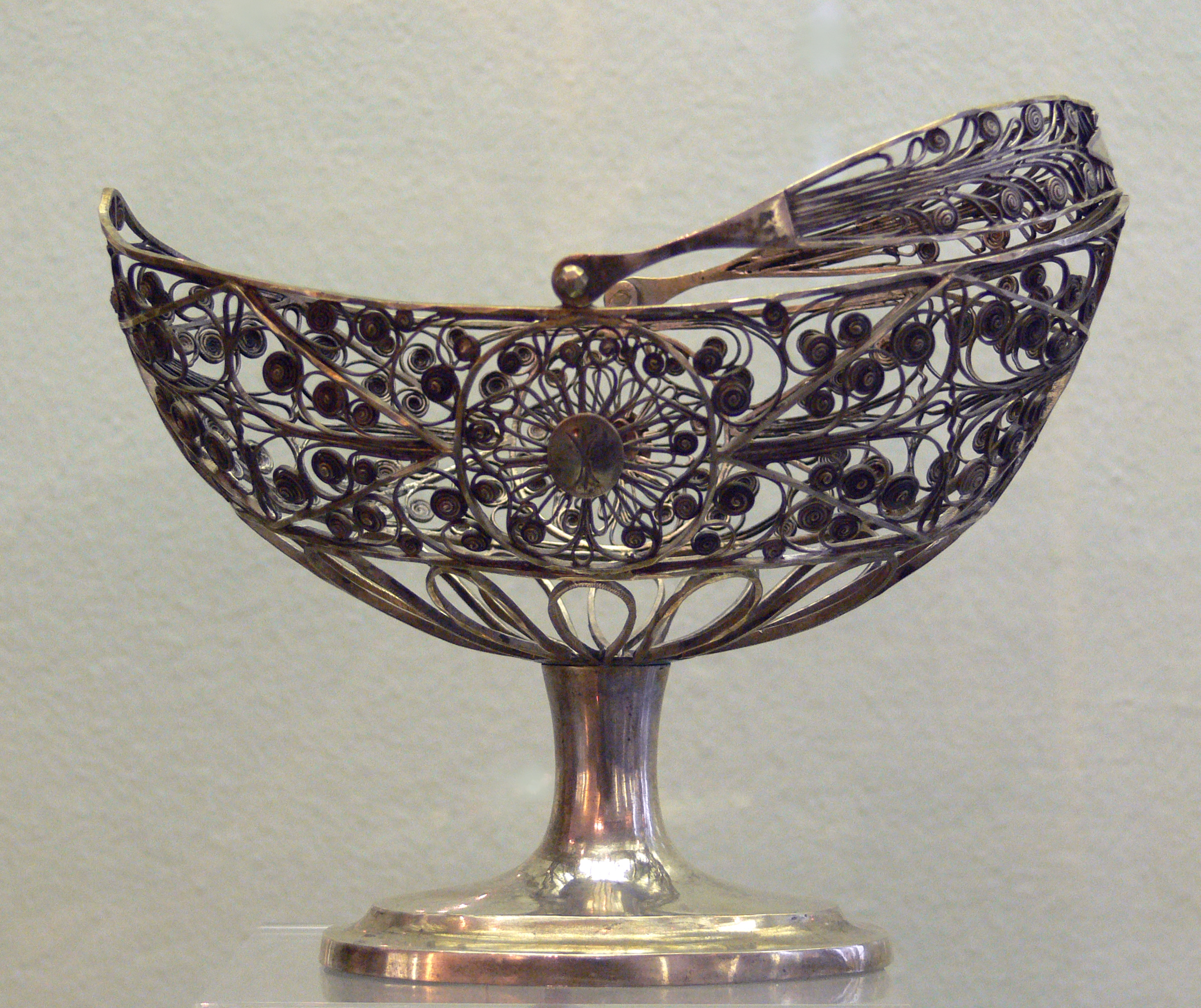 Zuckerkorb, Deutschland um 1810, 12lötiges Silber; Zucker-Museum Berlin, 5320/3/2000/0035